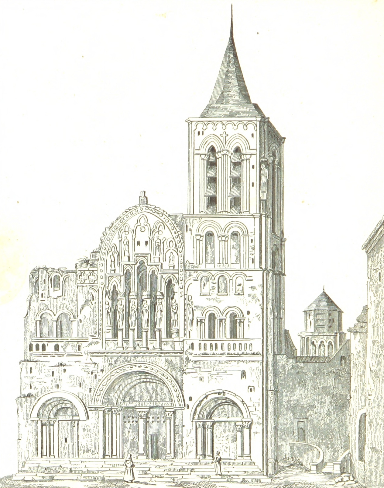 La façade occidentale de la basilique de Vézelay en 1836, gravure de la "France historique et monumentale" de Jean-Abel Hugo